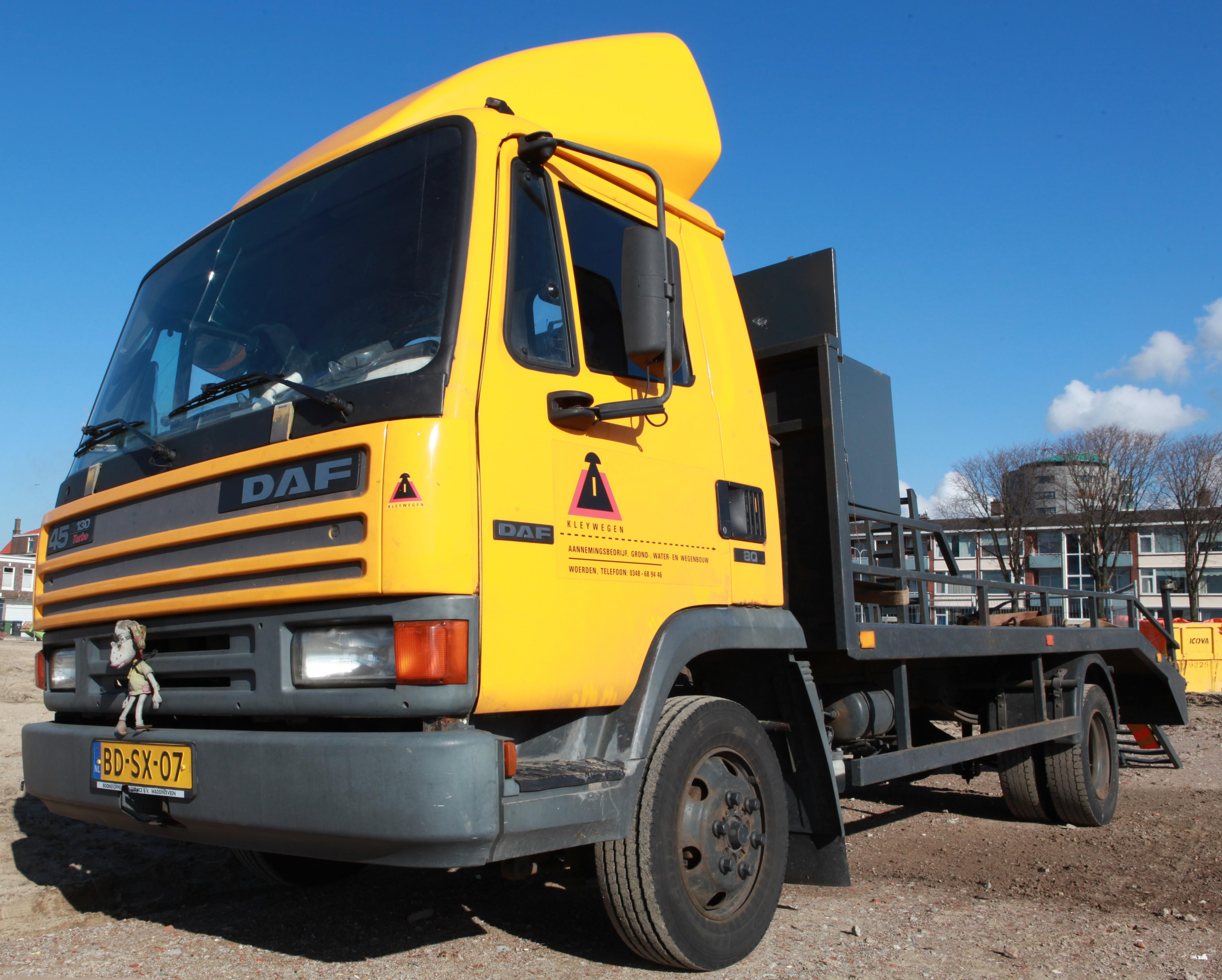 Daf 45.130 Kleywegen Woerden